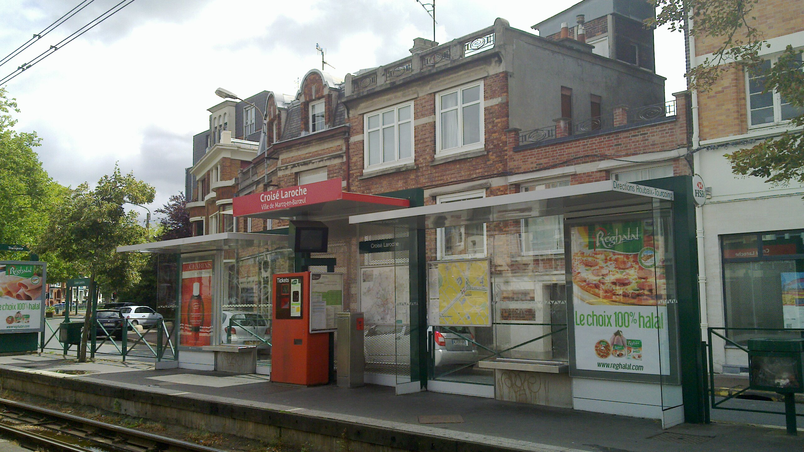 Station de tramway Croisé Laroche à Marcq-en-Barœul.